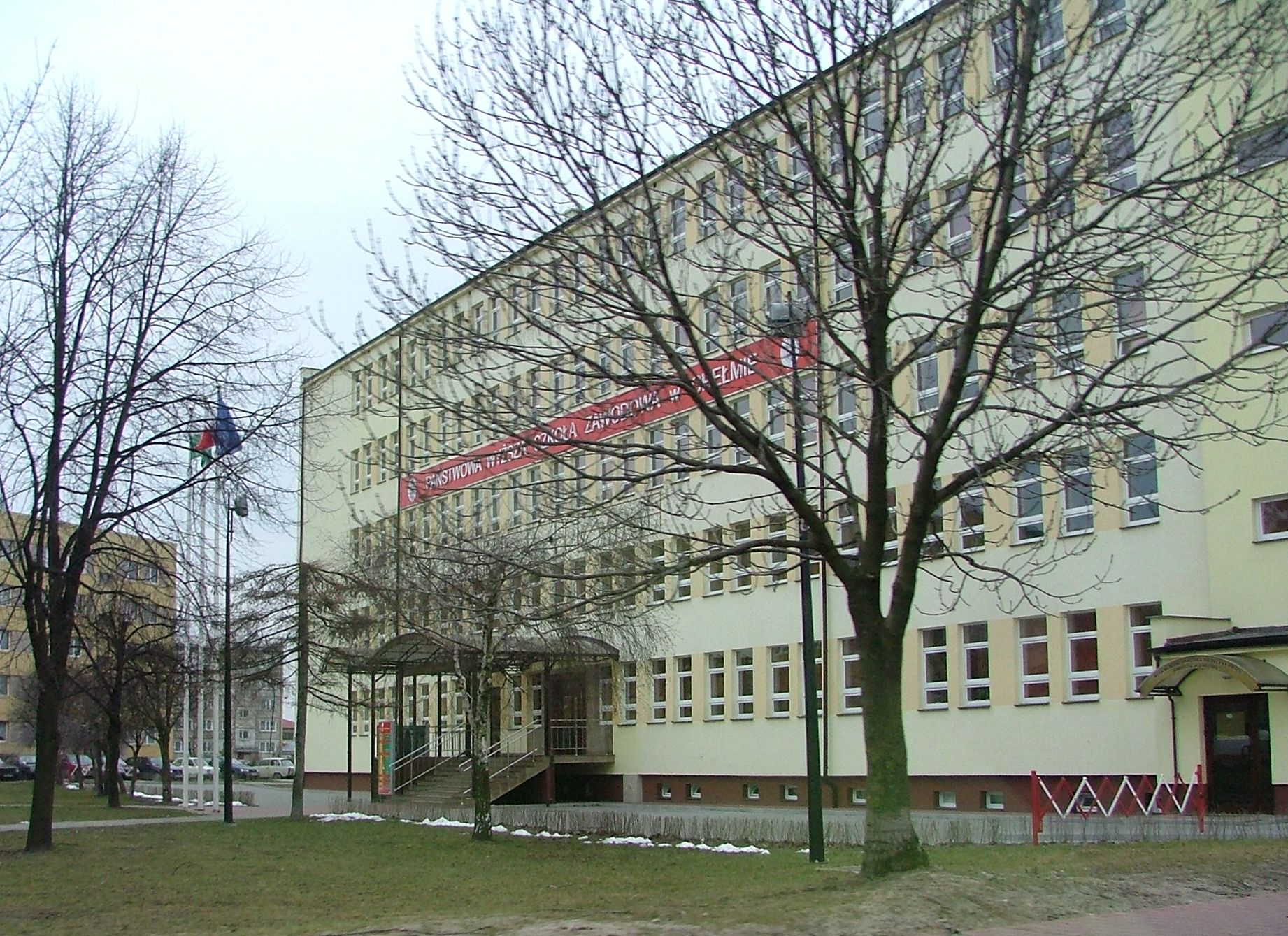 Państwowa Wyższa Szkoła Zawodowa w Chełmie, ul. Nowy Świat 3